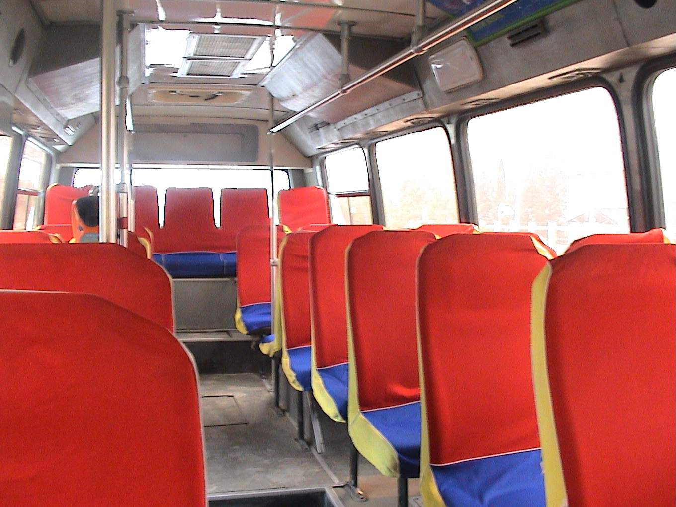 Beijing bus